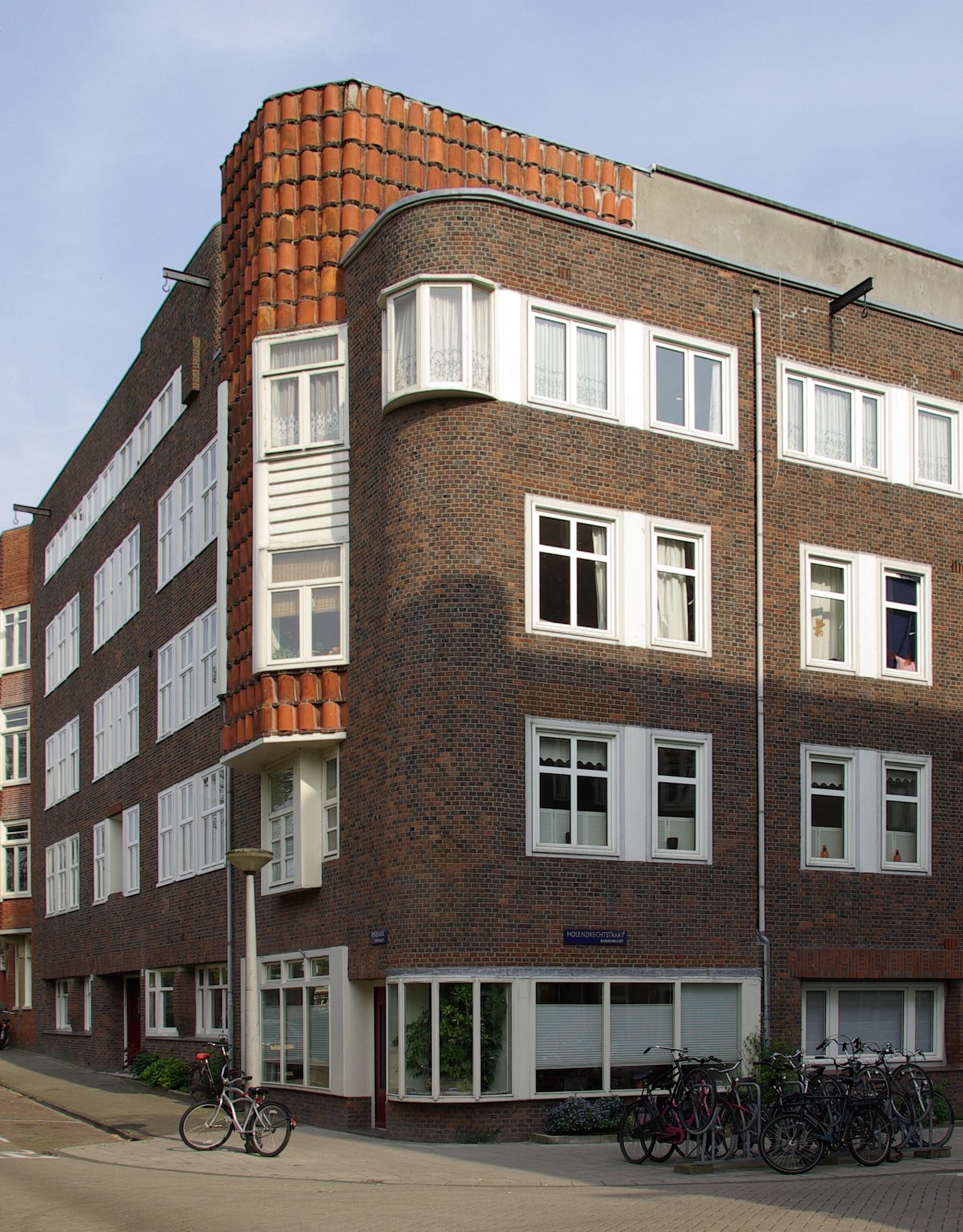 Hoek van Amstelkade en Holendrechtstraat, Woonhuis Holendrechtstraat 1-47 (1922/23), Amsterdam, architect: Margaret Staal-Kropholler